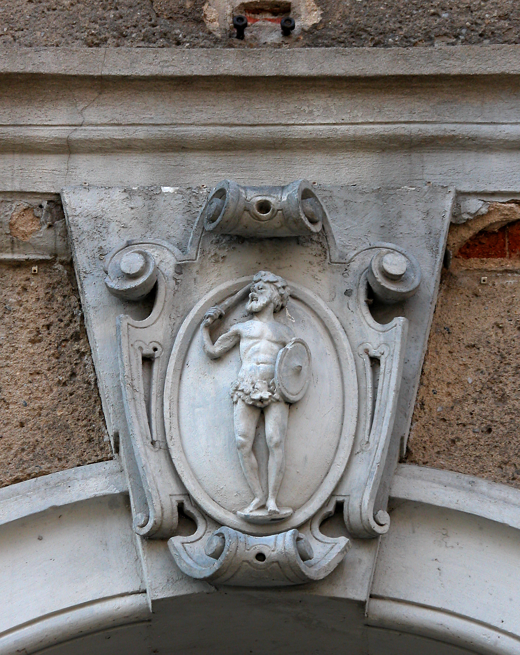 30.03.2007 01683 Wendischbora (zu Nossen): Wendischbora 55. Schloß Hofseite. Der Schlußstein über dem Eingang zeigt einen Teil des von Wöhrmannschen Wappens von 1852, den wilden nakten Mann, mit der Rechten ein Schwert schwingend und links einen Schild tragend. [DSCN21716.TIF]20070330225DR.JPG(c)Blobelt